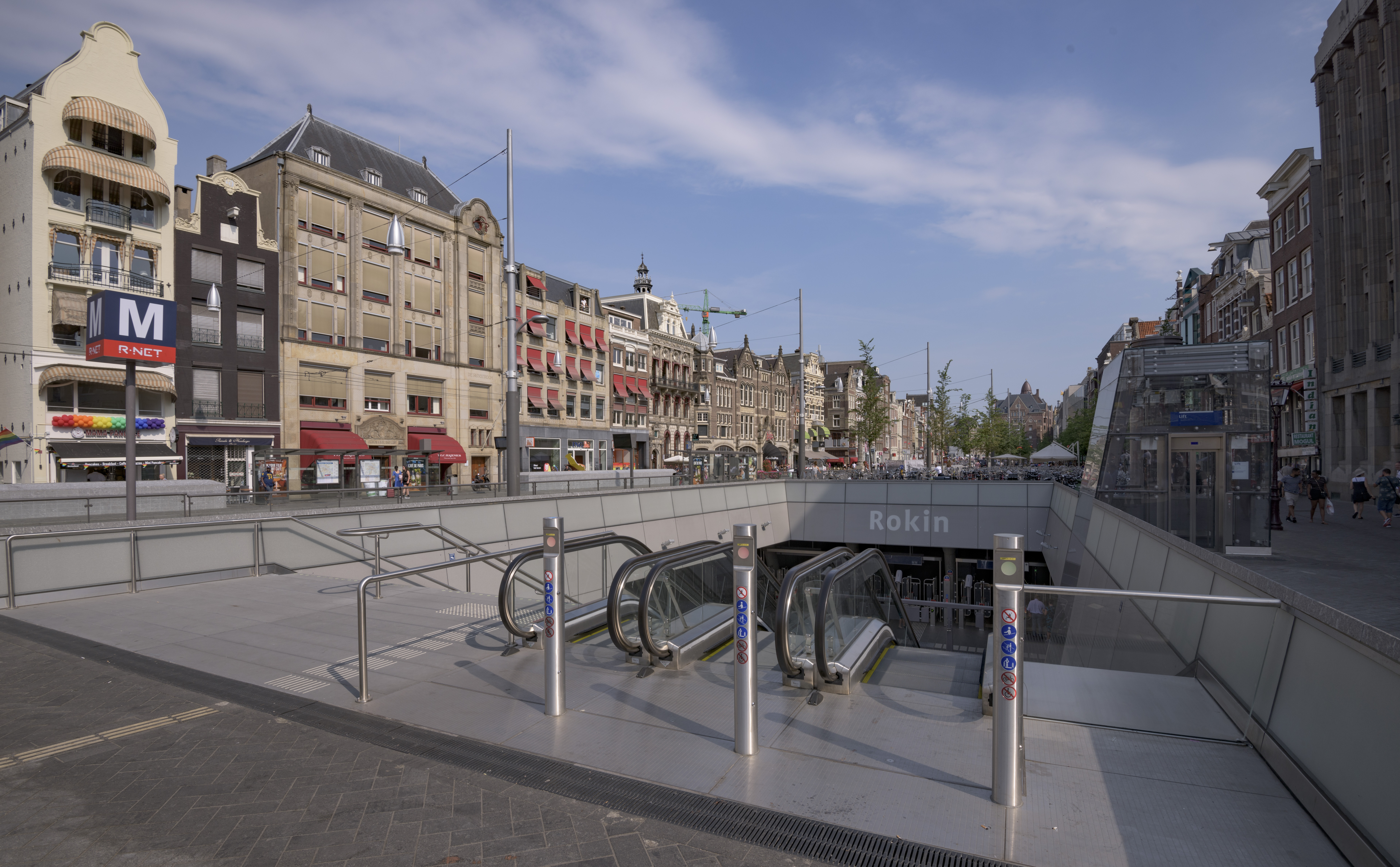 Metrostation Rokin